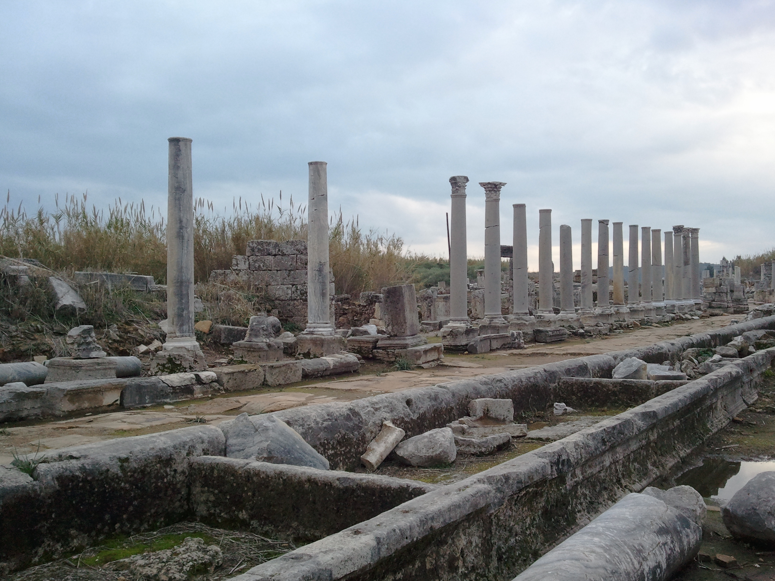 Perge Güney kısımı sütunlu cadde.